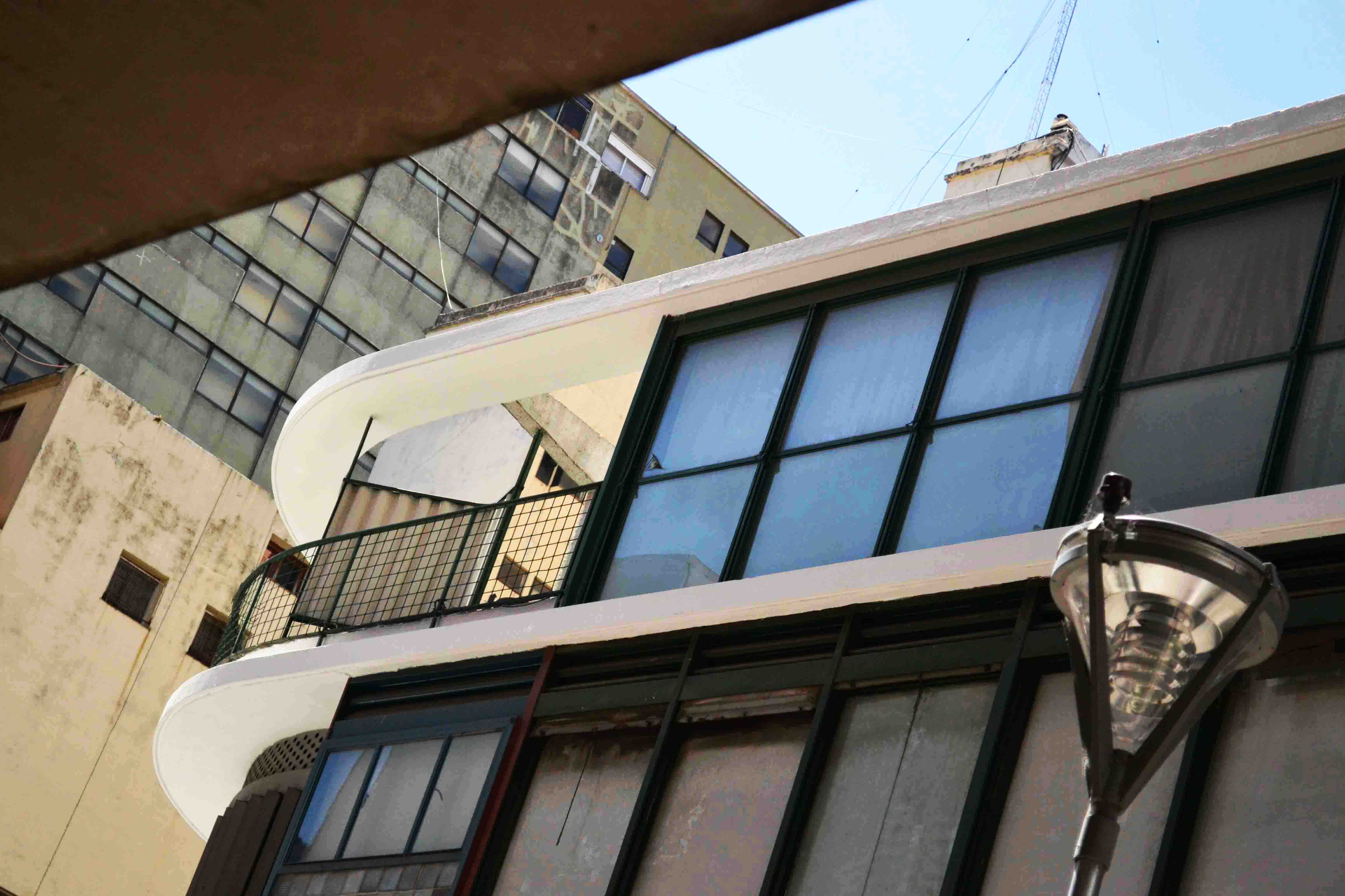 Los aventanamientos hechos en perfilarías de hierro, cierran el edificio de piso a techo, en cada una de las plantas.